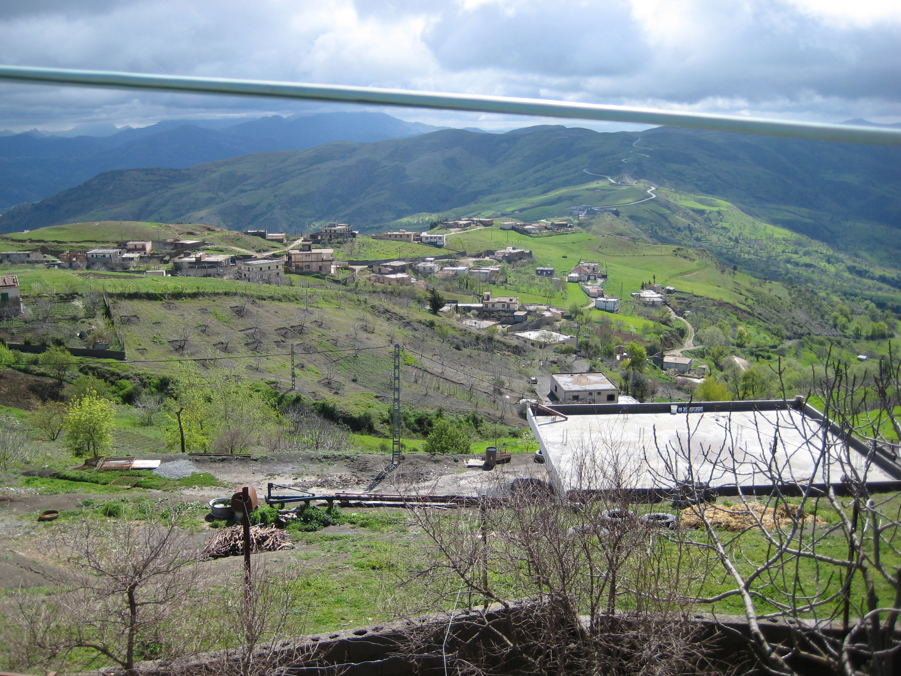 panorama